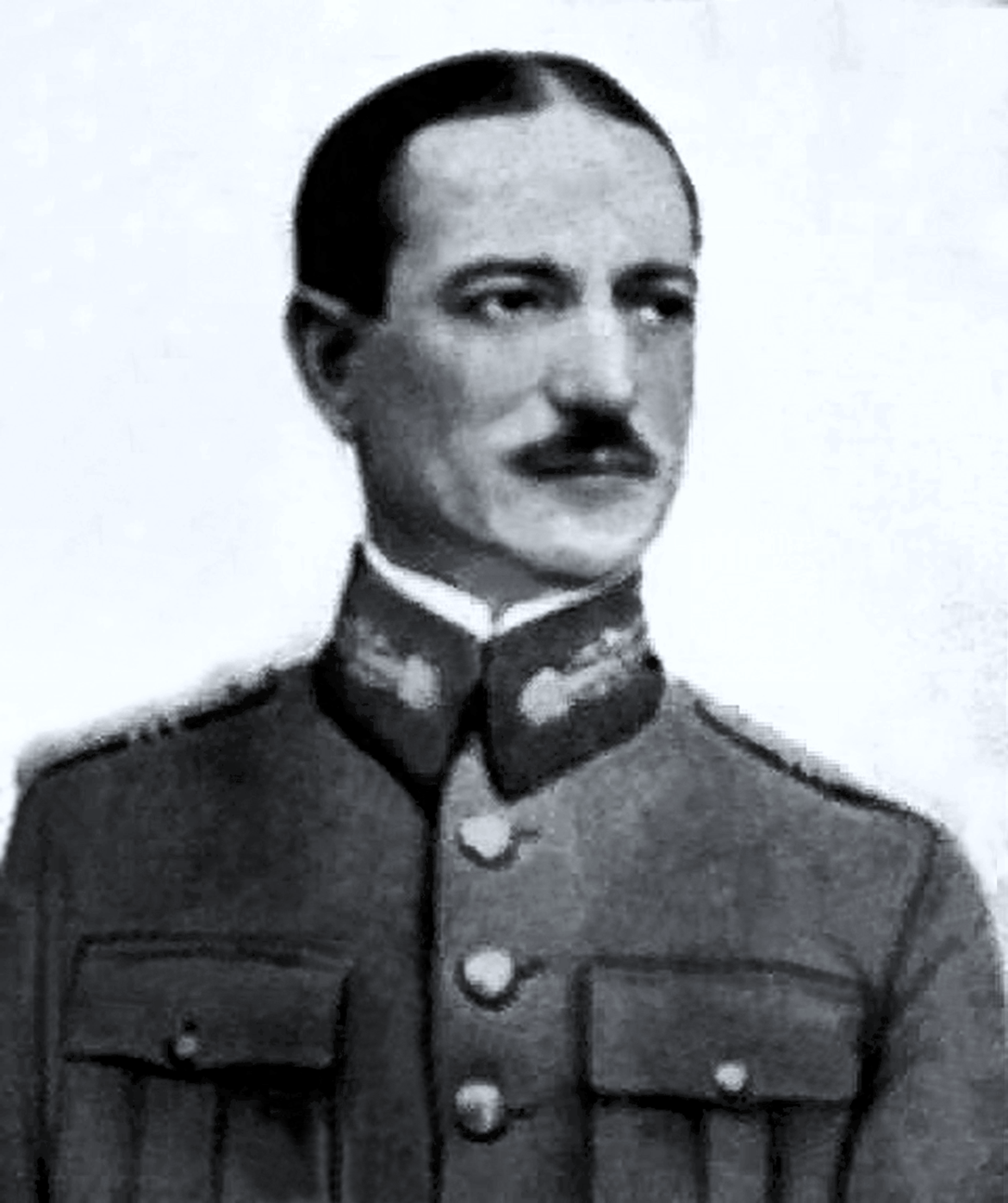 Generalul Vasile Atanasiu